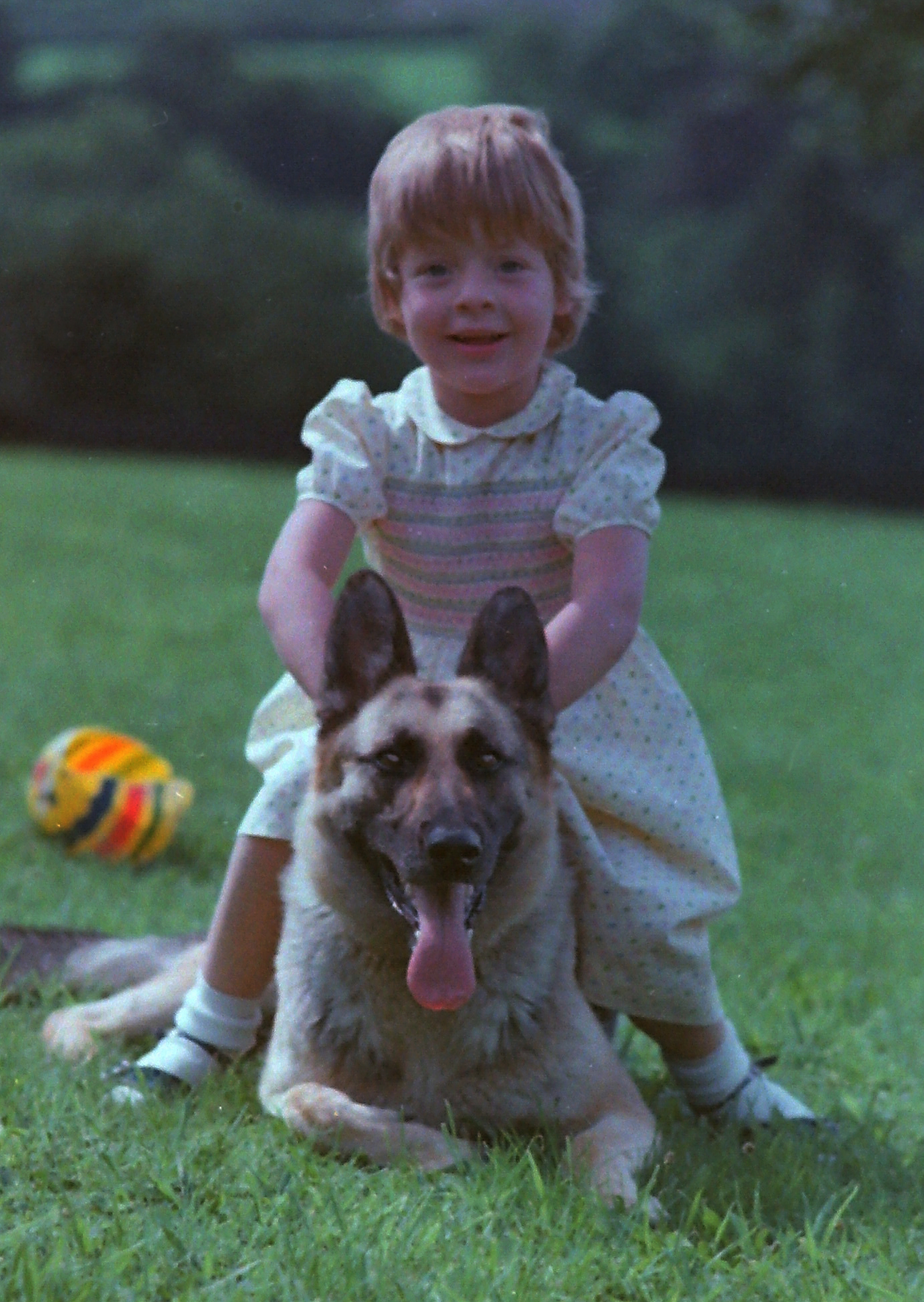 Sociabilité du berger allemand. Le berger allemand est très sociable.